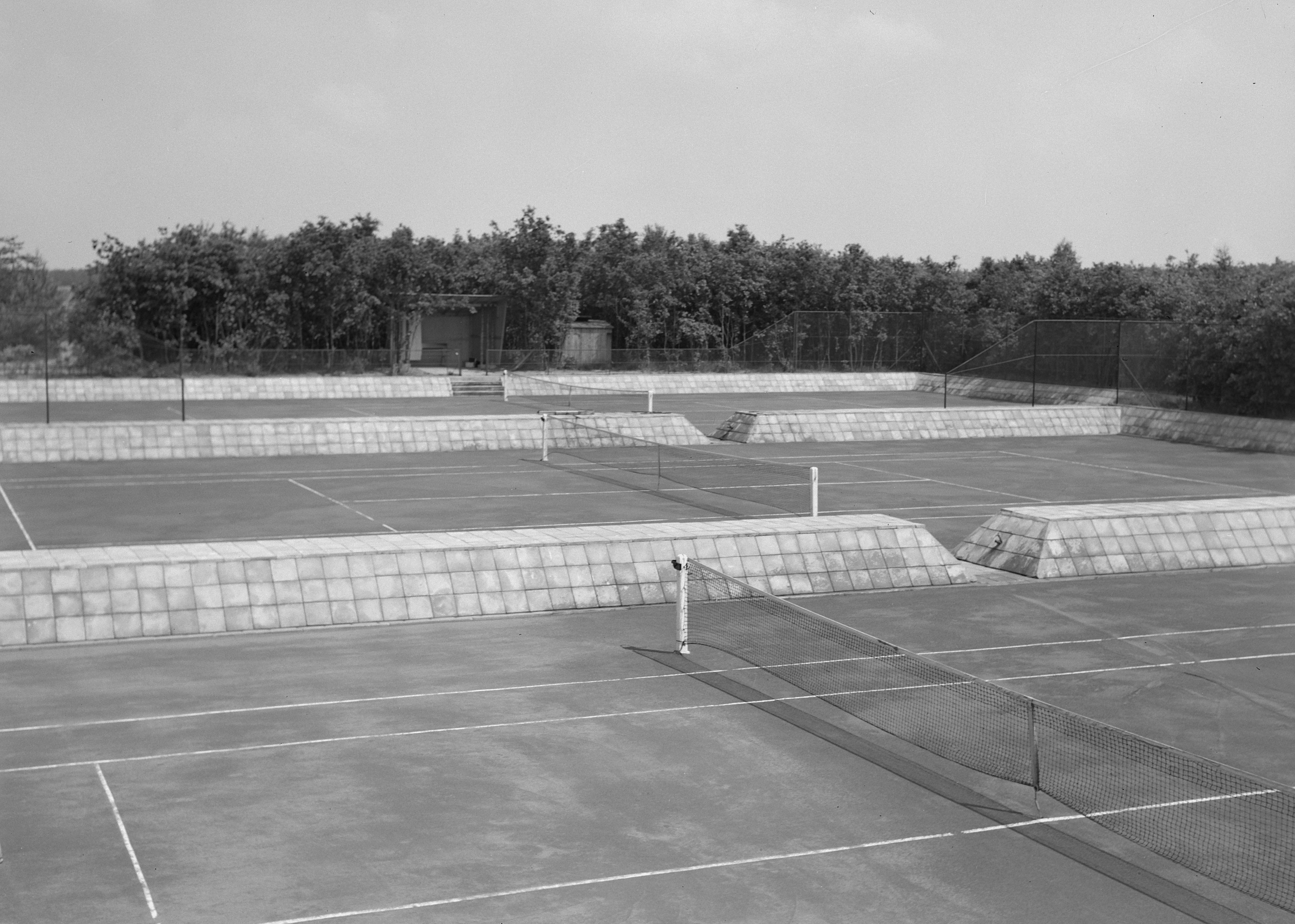 Collectie / Archief : Fotocollectie Nederlandse Heidemaatschappij Reportage / Serie : [ onbekend ] Beschrijving : recreatieterreinen, vliegvelden e.d., tennisbanen, de efteling Datum : juni 1953 Locatie : Kaatsheuvel Trefwoorden : recreatieterreinen, tennisbanen, vliegvelden e.d. Persoonsnaam : de efteling Fotograaf : Fotograaf Onbekend / Heidemij Auteursrechthebbende : Nationaal Archief Materiaalsoort : Negatief (zwart/wit) Nummer archiefinventaris : bekijk toegang 2.24.06.02 Bestanddeelnummer : 163-0373